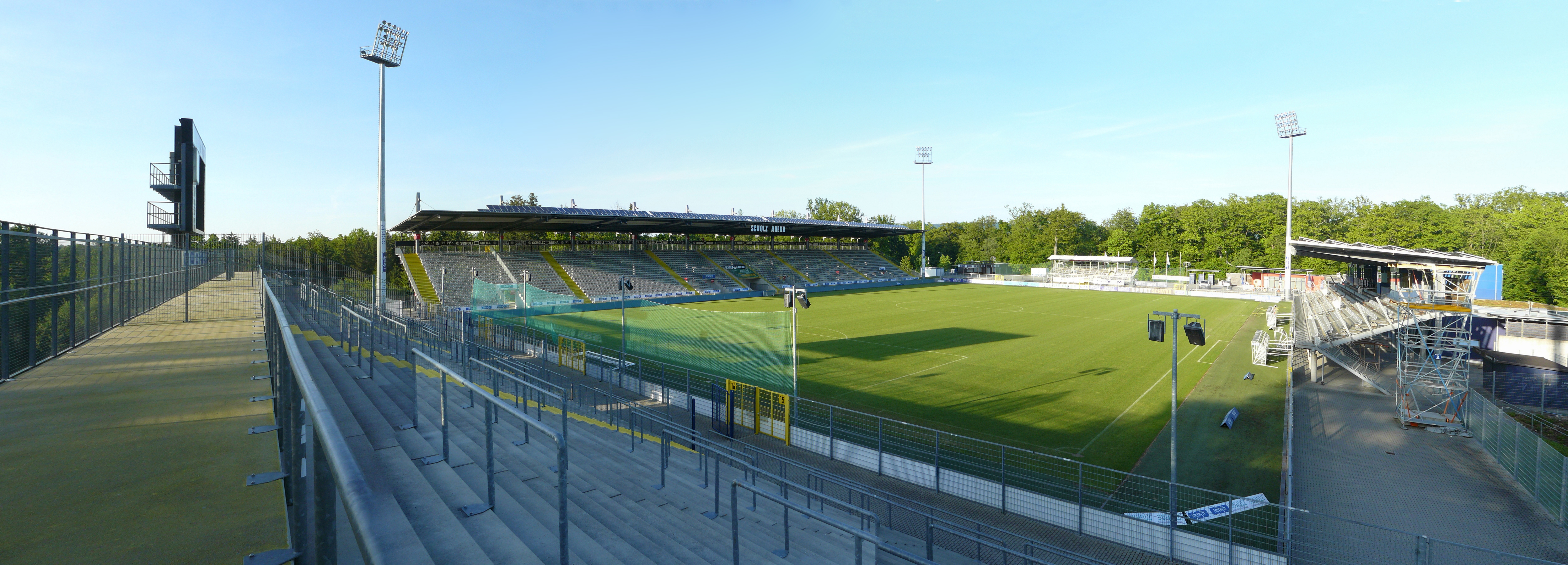 Aufnahme der Scholz Arena in Aalen im Mai 2012, von Block E (Westtribüne)